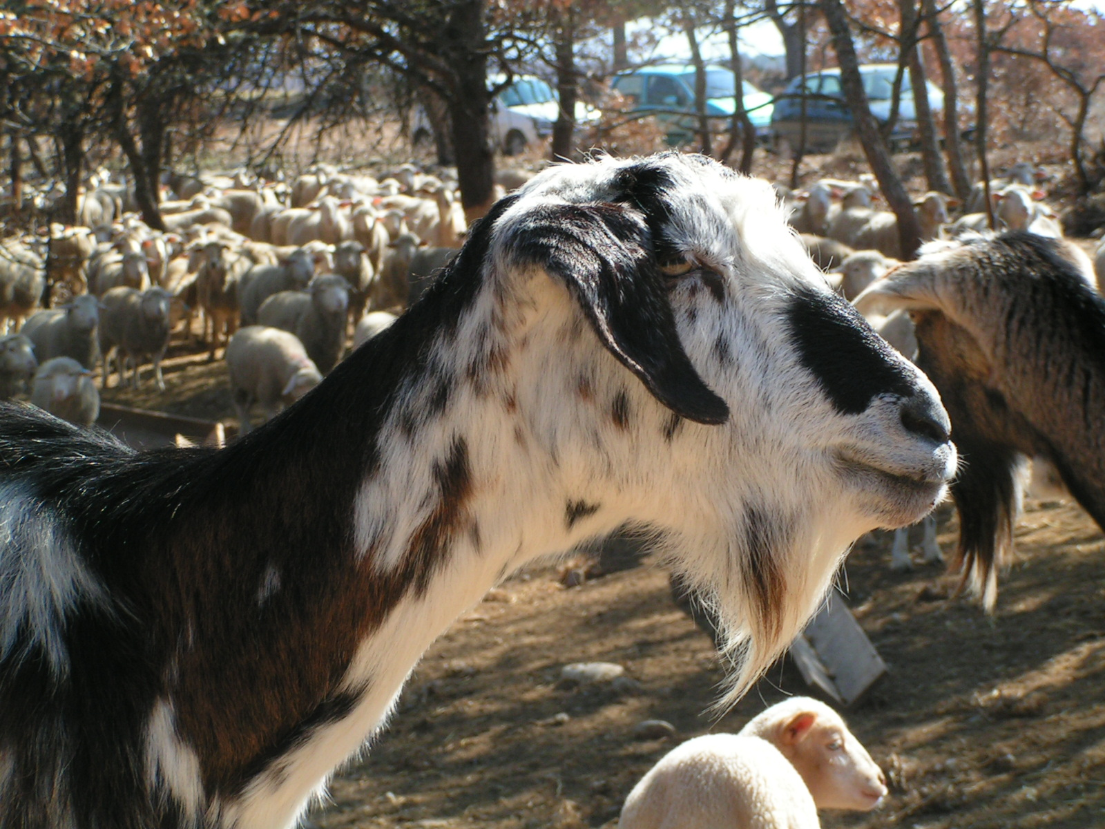 chèvre de race commune provençale